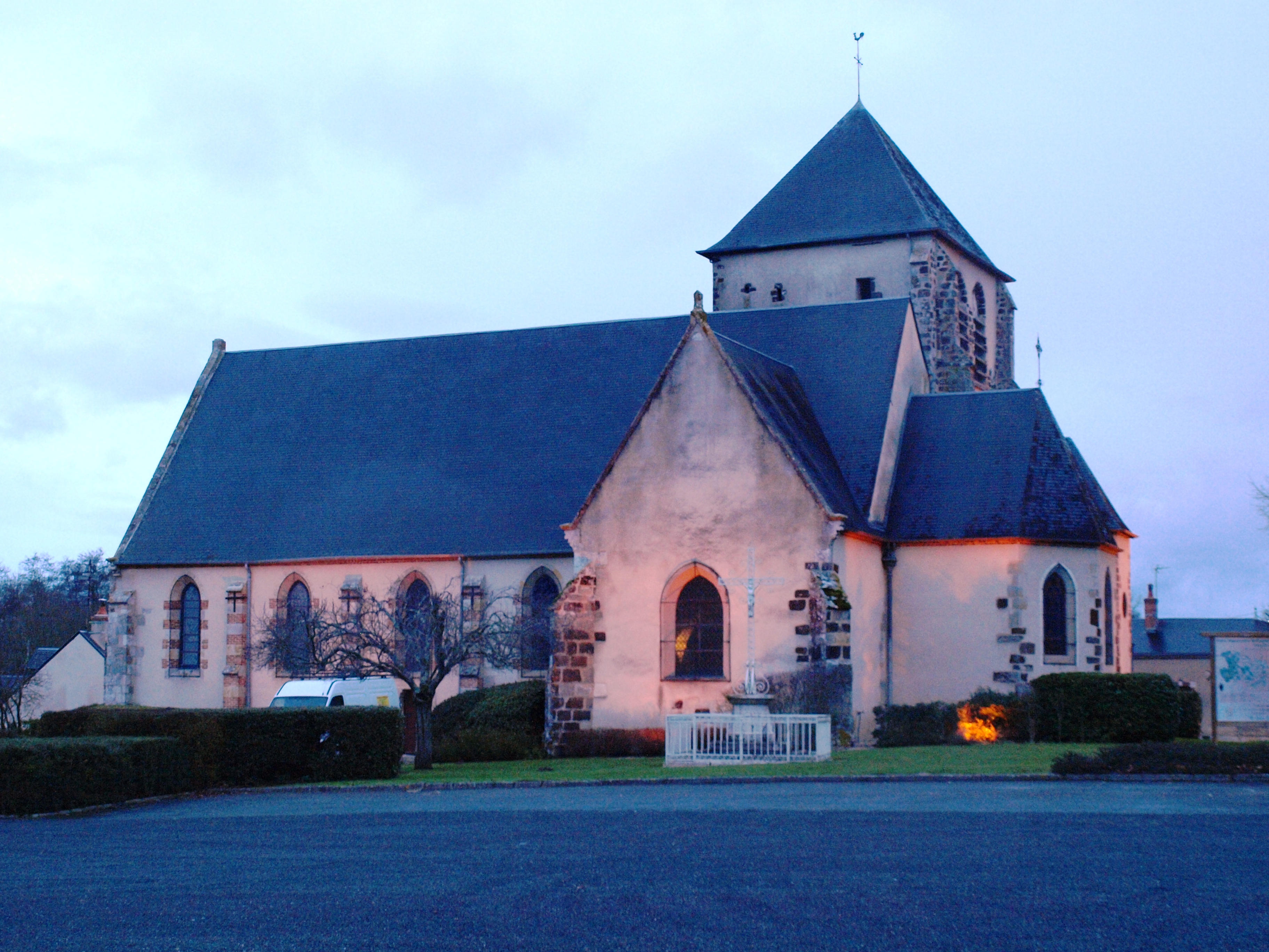 Église Saint-Martin d'Ennordres (Cher, France)